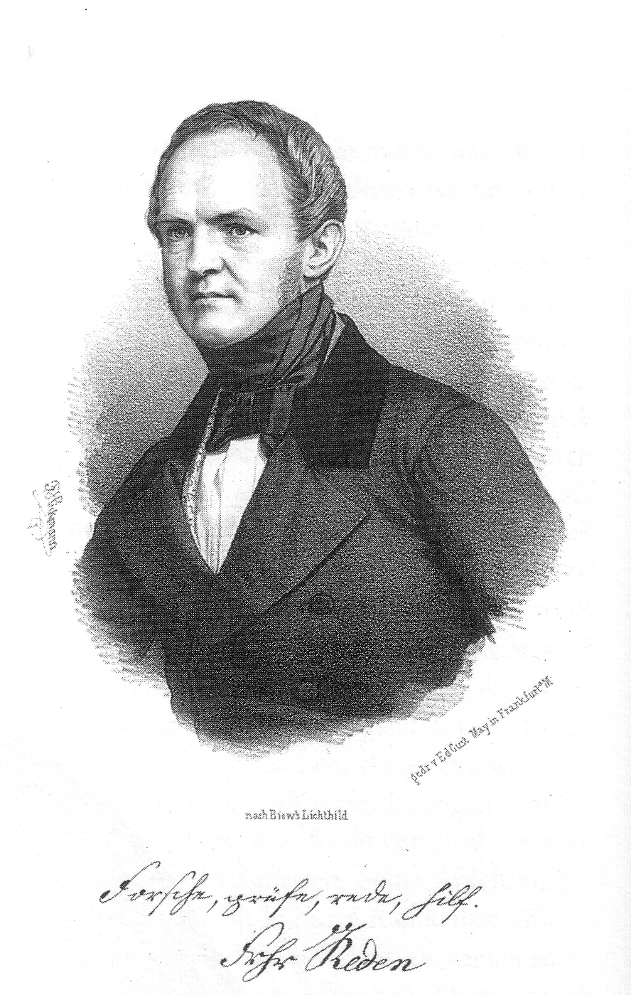 Friedrich Wilhelm von Reden (1802-1857), Abgeordneter der Paulskirche